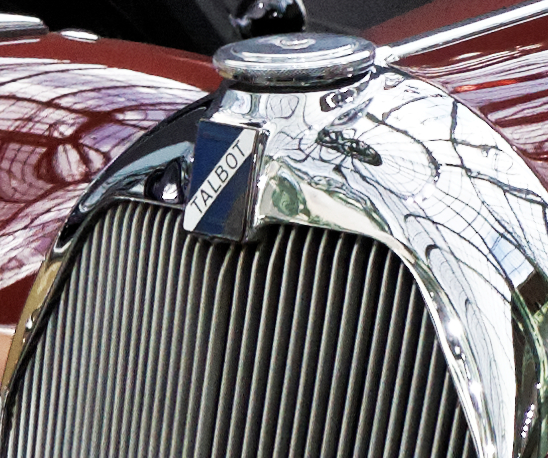 Une Talbot Lago T26 record cabriolet de 1947.